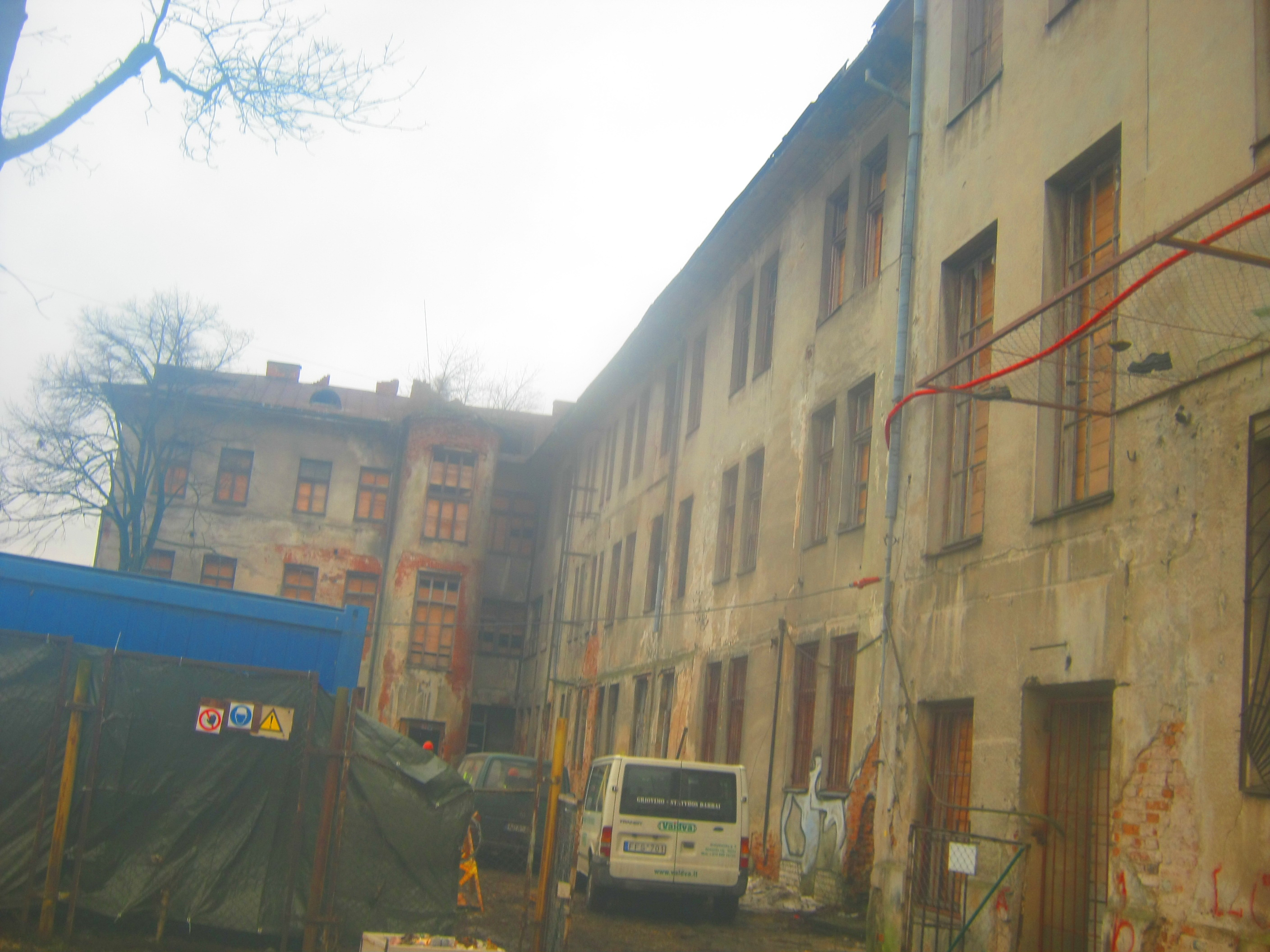 Buvusi žydų ligoninė Kaune